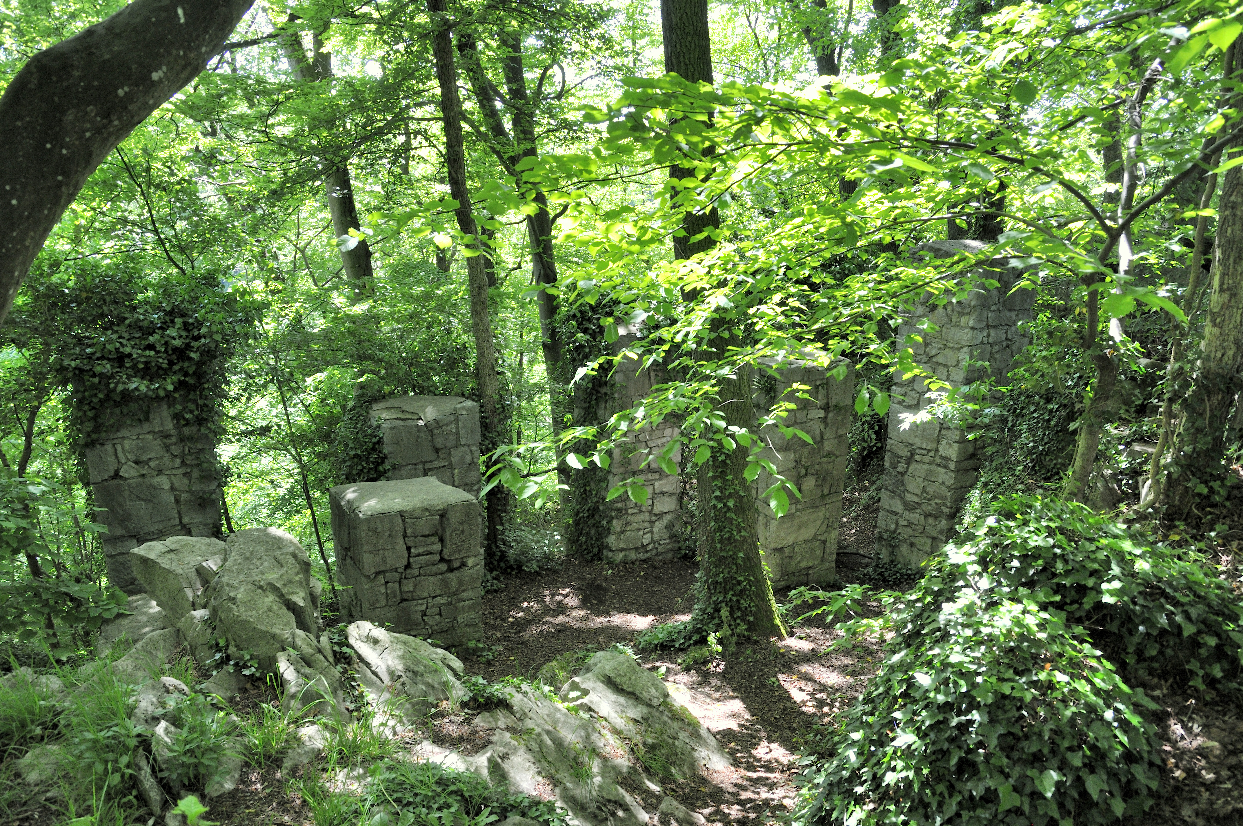 Relikte der Blausteinsäulen für den Pavillon von Napoleons Stieftochter Hortense de Beauharnais an der Klause Kornelimünster